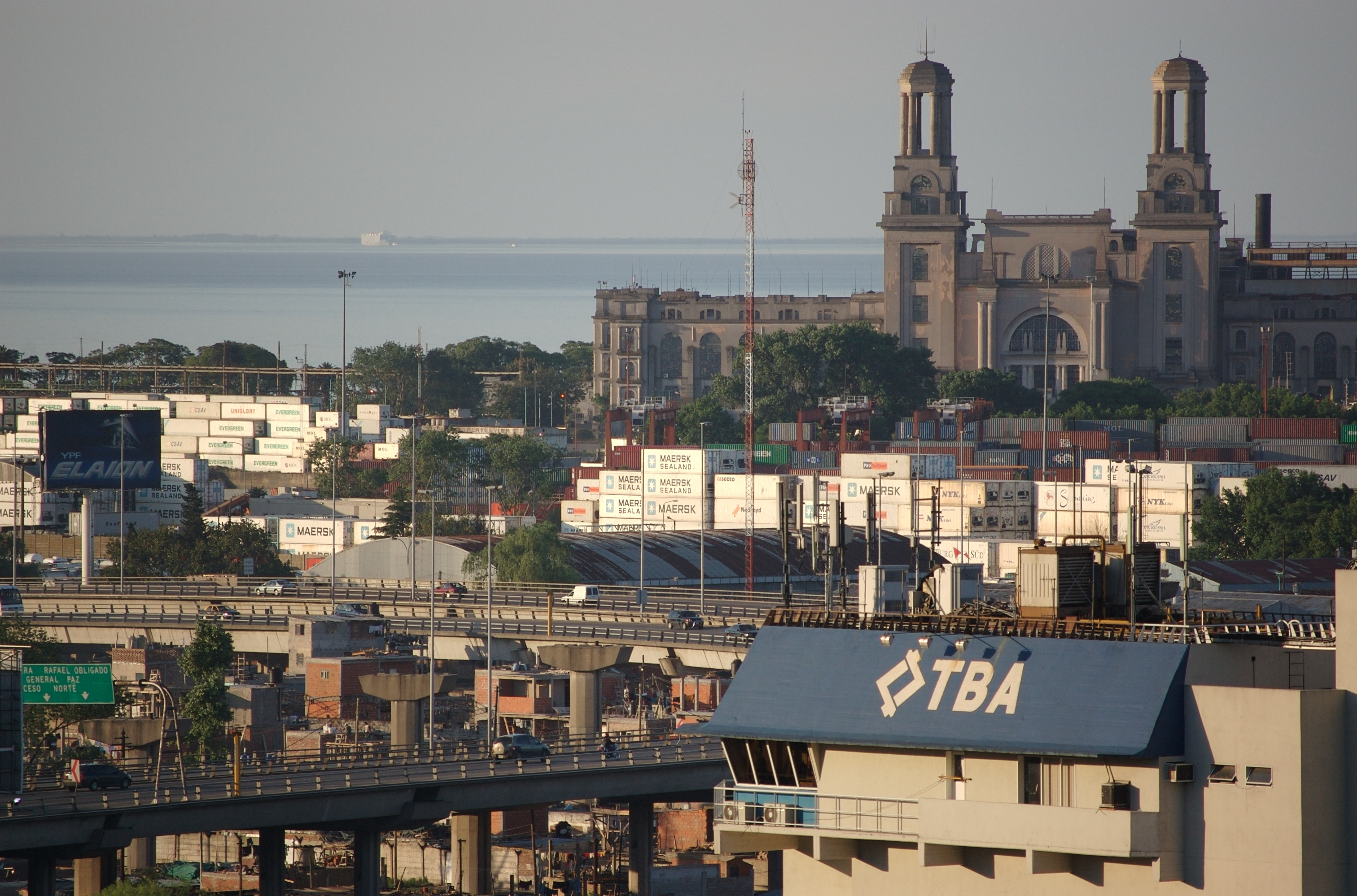 Puerto de Buenos Aires, Argentina. Se ve parte de la Autopista Illia.